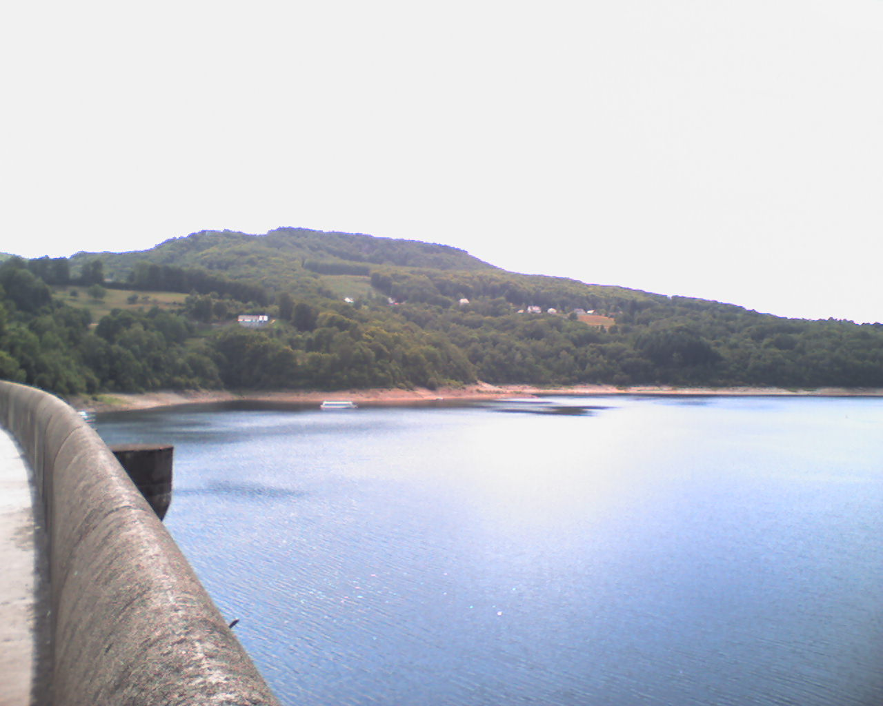 Photo du lac du barrage de bort les orgues en Correze prise depuis la route au dessus du barrage